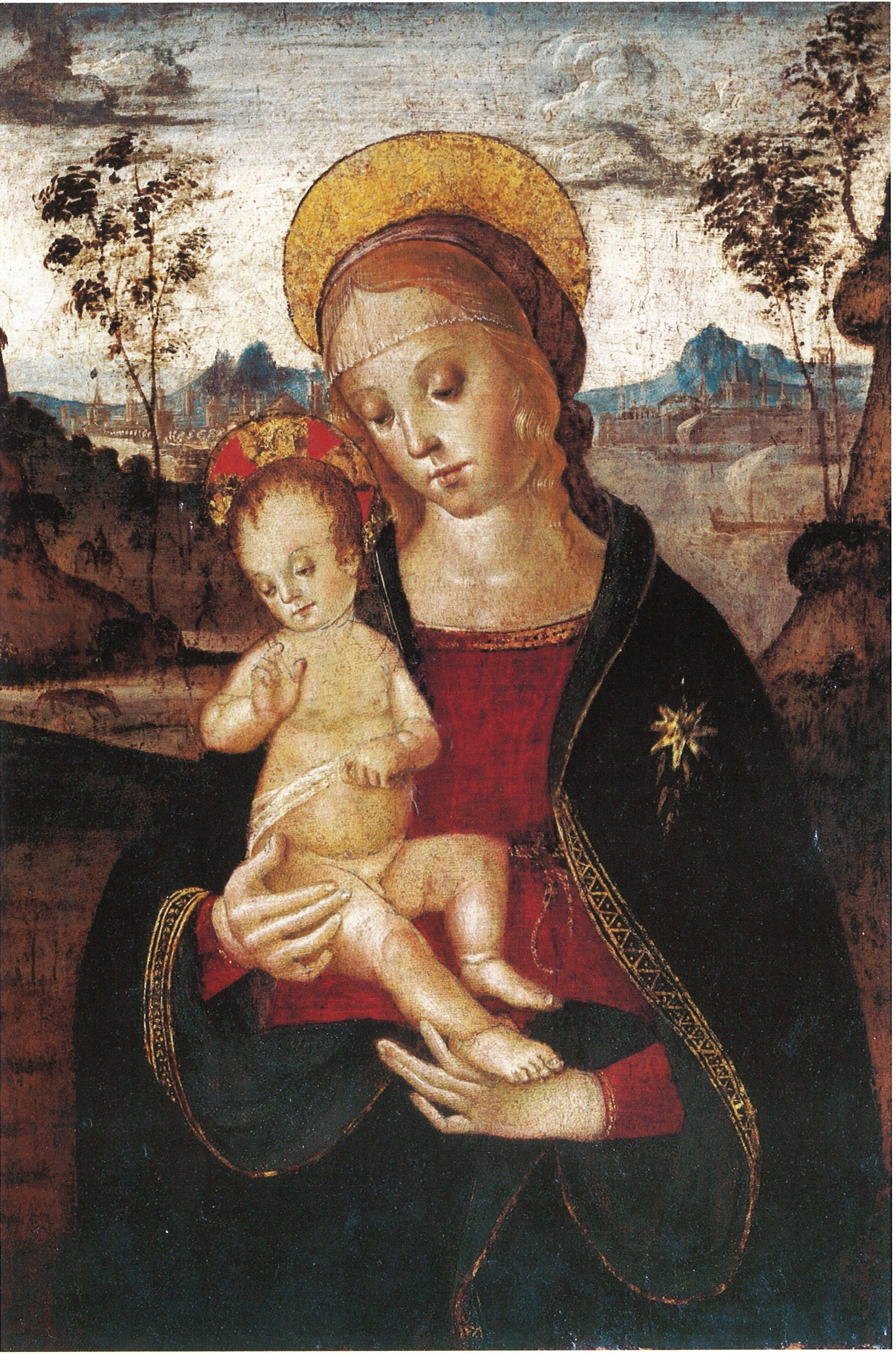 Madonna con Bambino benedicente Tempera su tavola 53x43cm Fondazione Sorgente Group